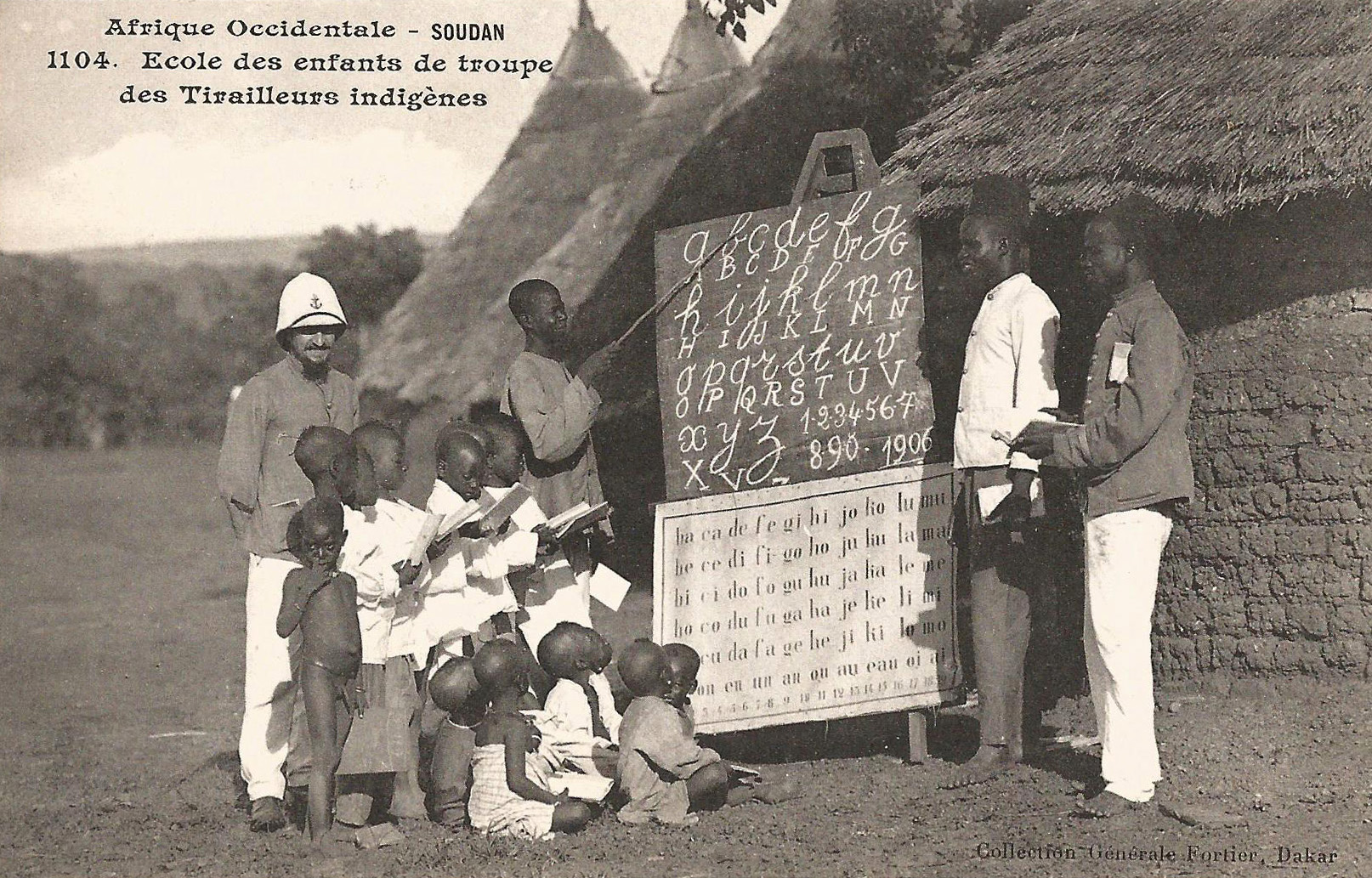 François-Edmond Fortier, Ecole des enfants de troupe des Tirailleurs indigènes. Afrique Occidentale - Soudan.